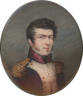 Беларуская (тарашкевіца): Партрэт Канстантына Тызэнгаўза (Kanstantyn Tyzenhaus)